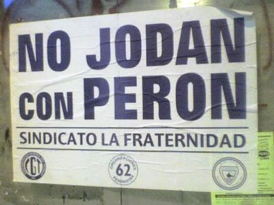 Cartel del sindicato La Fraternidad, parte del gremio de ferroviarios, defendiendo a Perón cuando se comenzó a investigar la responsabilidad de Isabel Perón en la creación de la Triple A.